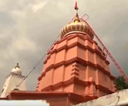 বক্রেশ্বর শক্তিপীঠ